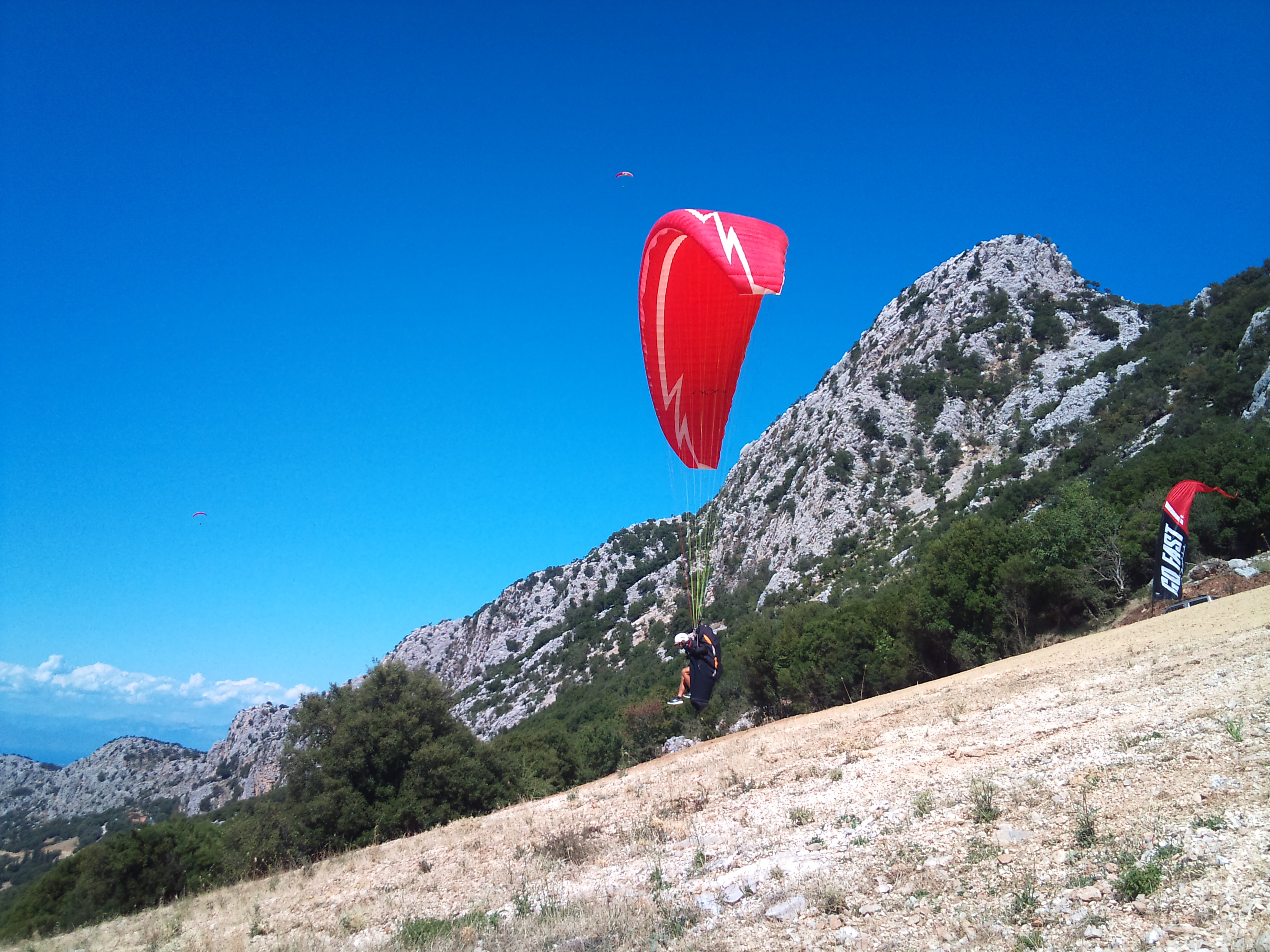 Πίστα διεθνών προδιαγραφών